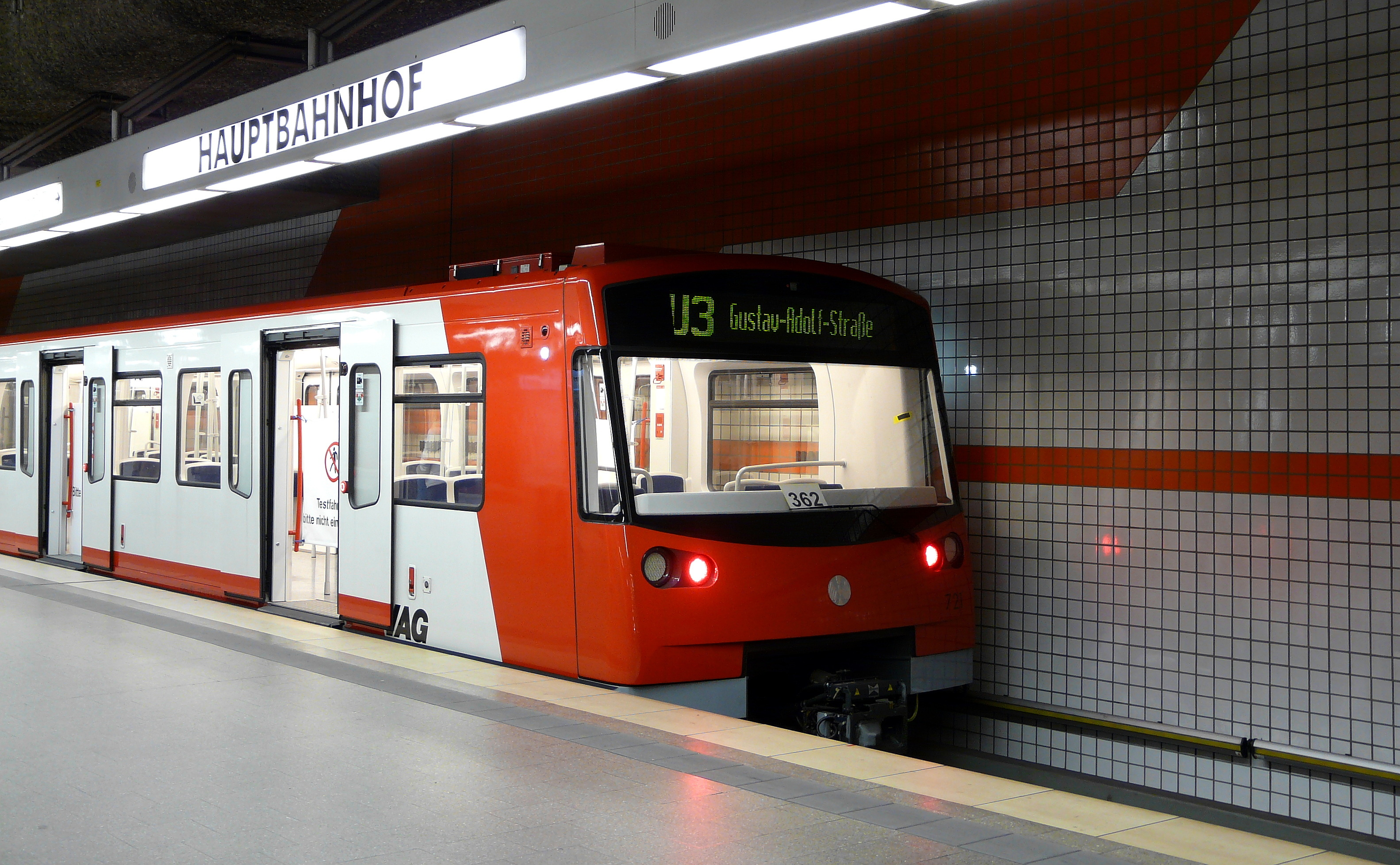 Im U-Bahnhof Nürnberg Hauptbahnhof: Ein Triebwagen der Baureihe DT3 bei Testfahrten im Rahmen des Projektes RUBIN